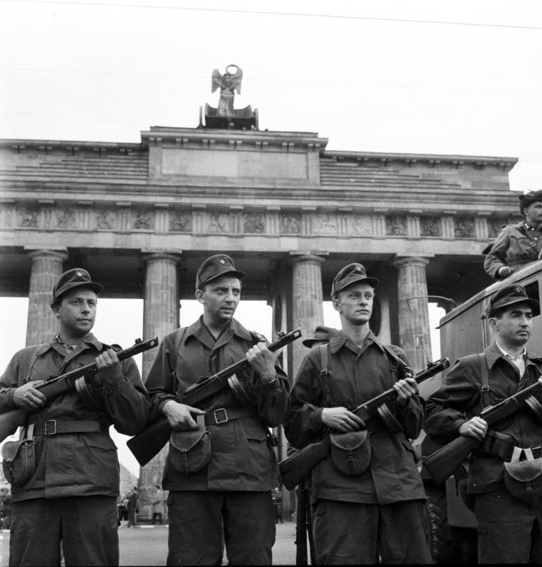 Berlin, Mauerbau, am Brandenburger Tor ADN-ZB/Junge, 14.8.1961 Sicherung der Staatsgrenze der DDR zu Westberlin und zur DDR am 13.8.1961. Angehörige der Kampfgruppe auf der westlichen Seite des Brandenburger Tores am 14.8.1961 [Berlin, Brandenburger Tor.- Mitglieder der Kampfgruppen Paul Stiawa, Joachim Behrens, Roland Höfer und Werner Fromm [vgl. Bild 183-E0811-0042-001, Bild 183-Z0731-400, Bild 183-1987-0704-057